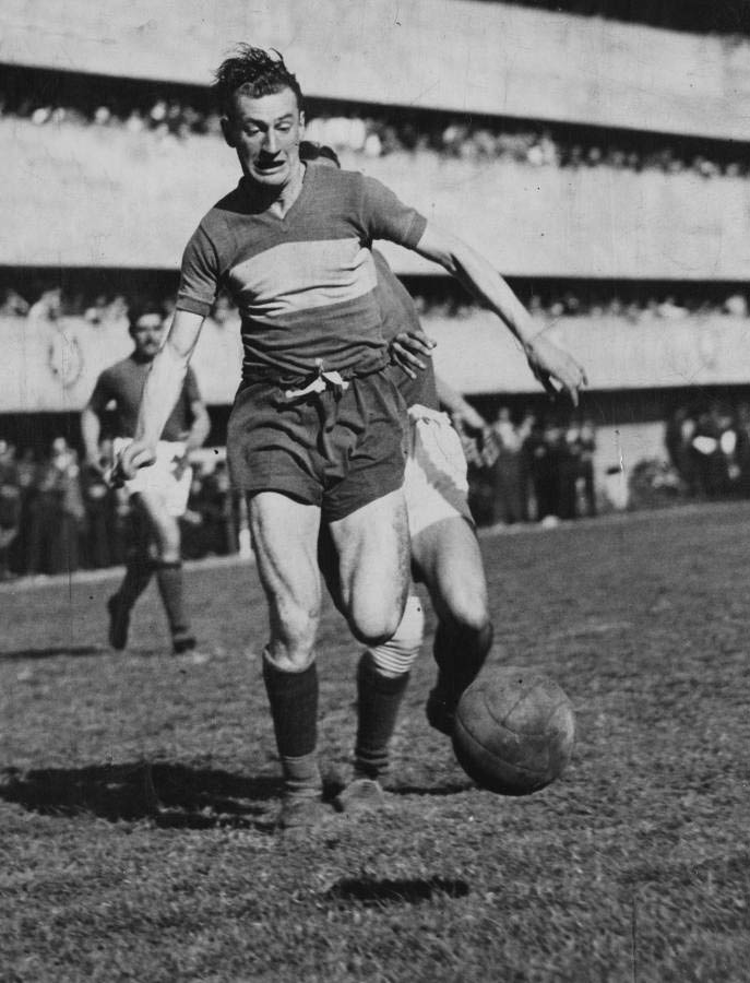 Mario Boyé, uno de los mejores jugadores de Boca Juniorsde la época de los '40 y '50 e ídolo del club.